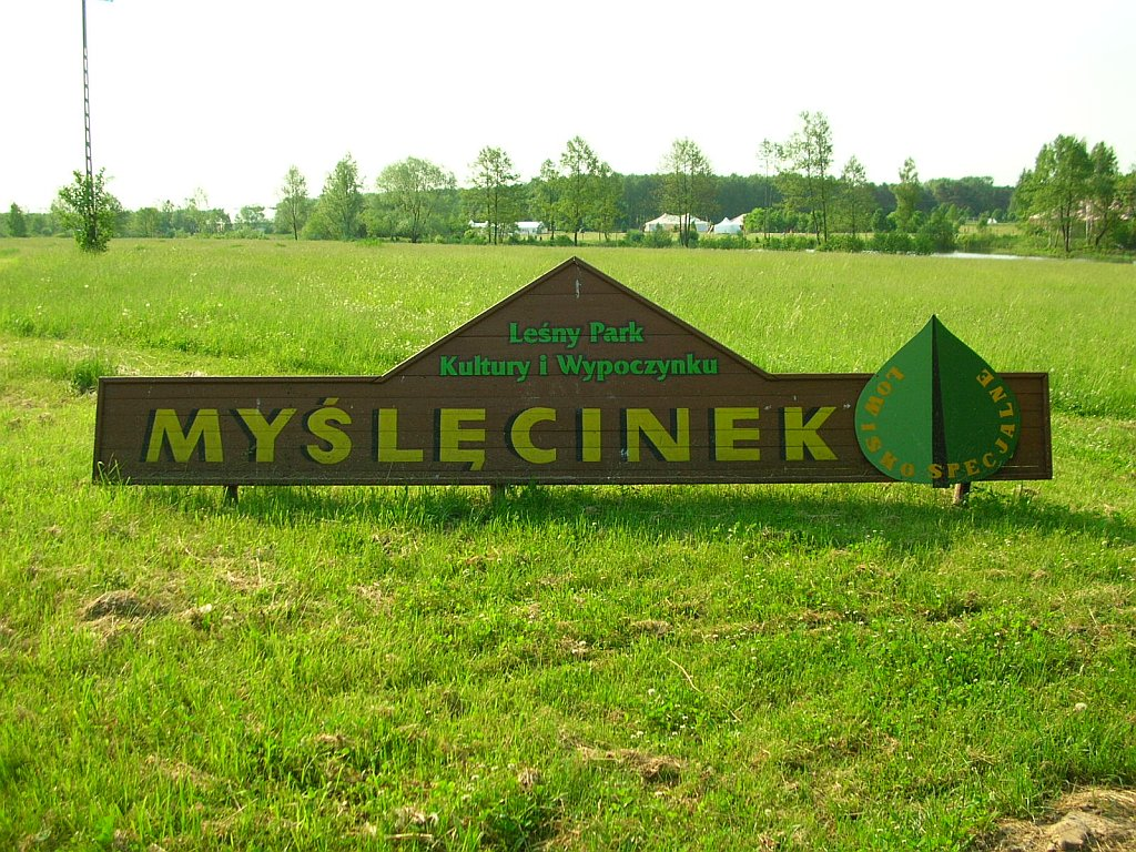 Park w Myślęcinku